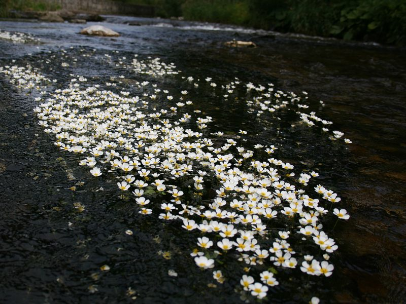 Włosienicznik pędzelkowaty Ranunculus penicillatus subsp. pseudofluitans roślina z rodziny jaskrowatych.